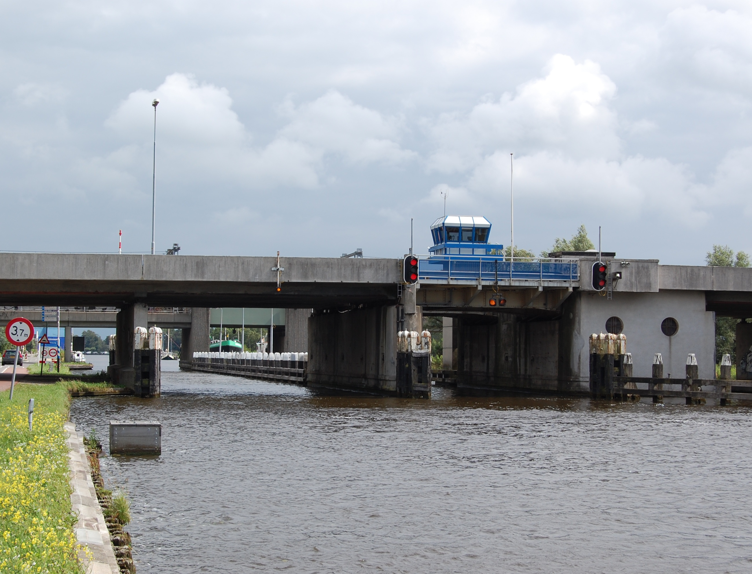 Kaagbrug, de brug in de Rijksweg A44 bij De Kaag over de Ringvaart van de Haarlemmermeer. Achter de verkeersbrug ligt een spoorbrug van de Schiphollijn.